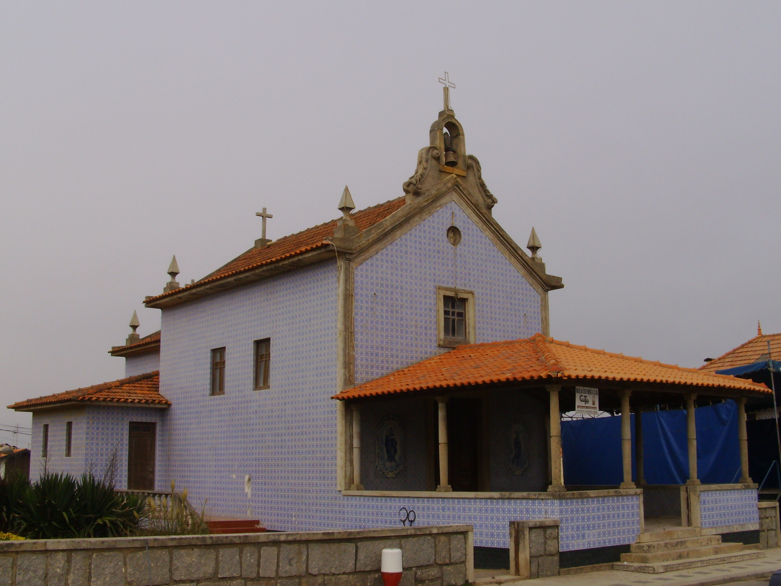 Capela de Nossa Senhora de Nazaré, praia de Cortegaça, concelho de Ovar, distrito de Aveiro, Portugal.